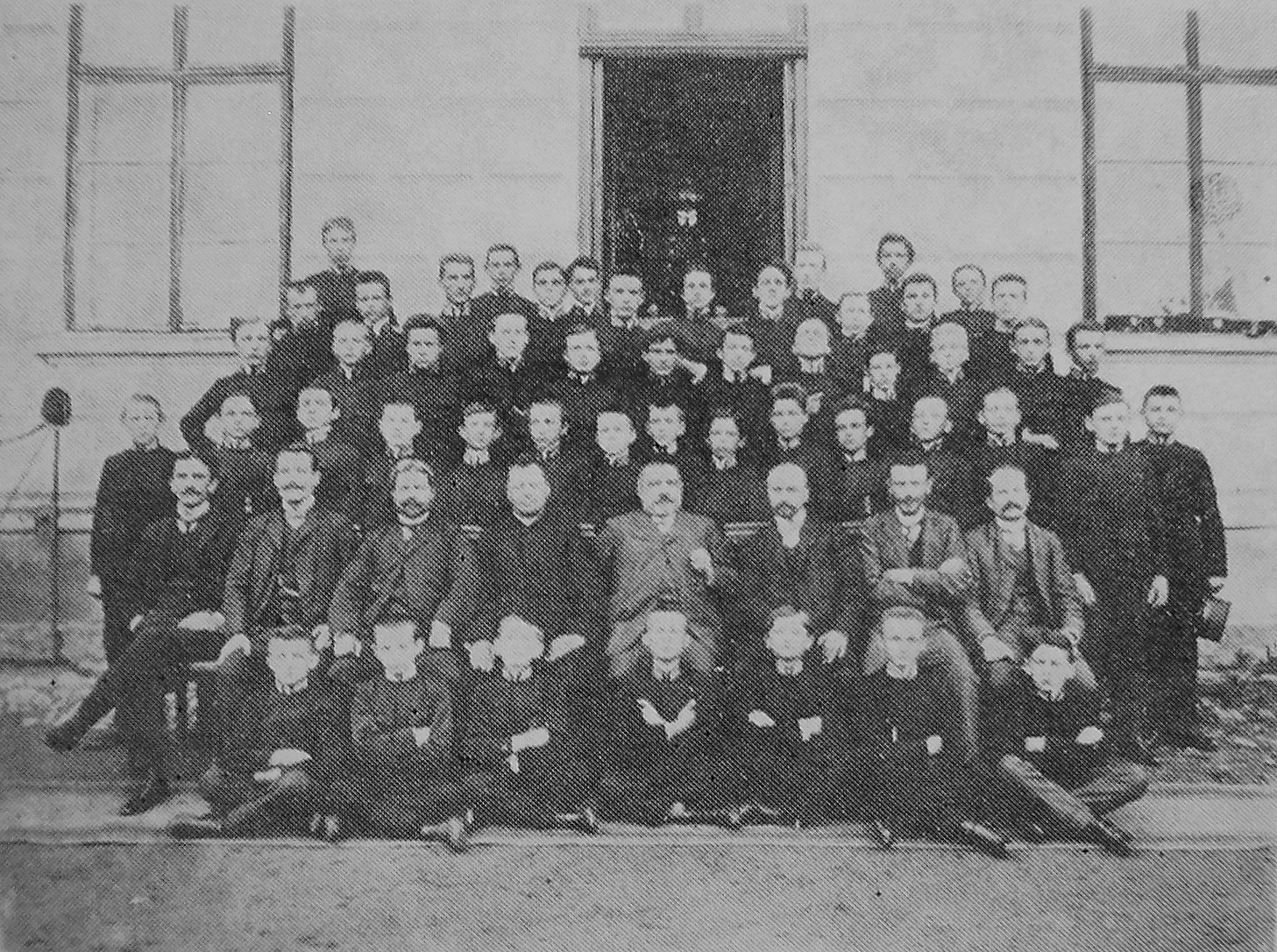 Klasa IVa C. K. Gimnazjum w Sanoku (czerwiec 1906). Na ziemi siedzą w pierwszym rzędzie uczniowie (od lewej): Zdzisław Mozołowski, Aleksander Atlas, Roman Królicki, Jan Holak, Michał Czajkowski, Józef Wyszatycki, Franciszek Bielak. Siedzą w drugim rzędzie nauczyciele (od lewej): Feliks Czerwiński, Karol Kaliszczak, Adam Pytel, ks. dr Józef Drozd, dyr. Włodzimierz Bańkowski, Kajetan Golczewski, Roman Kowalów, Józef Sulisz.